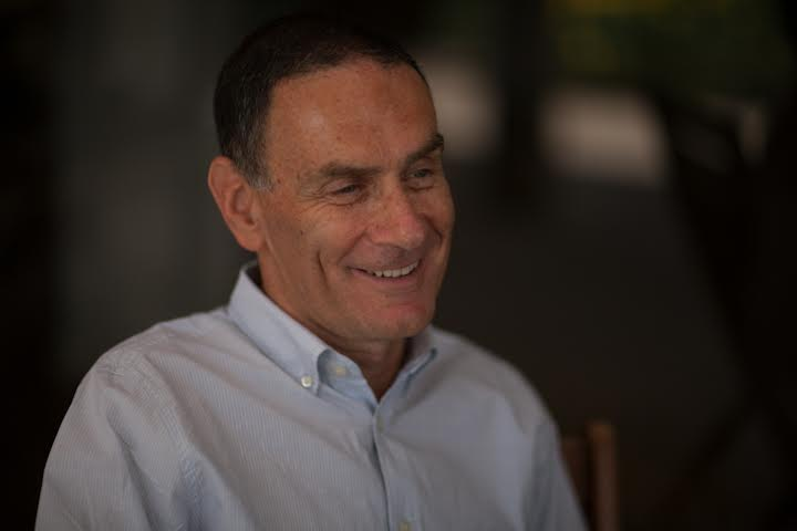 אביהוא (אבי) גוט, יועץ תקשורת ויועץ אסטרטגי ששמו נקשר בפרשת "מסמך הרפז".